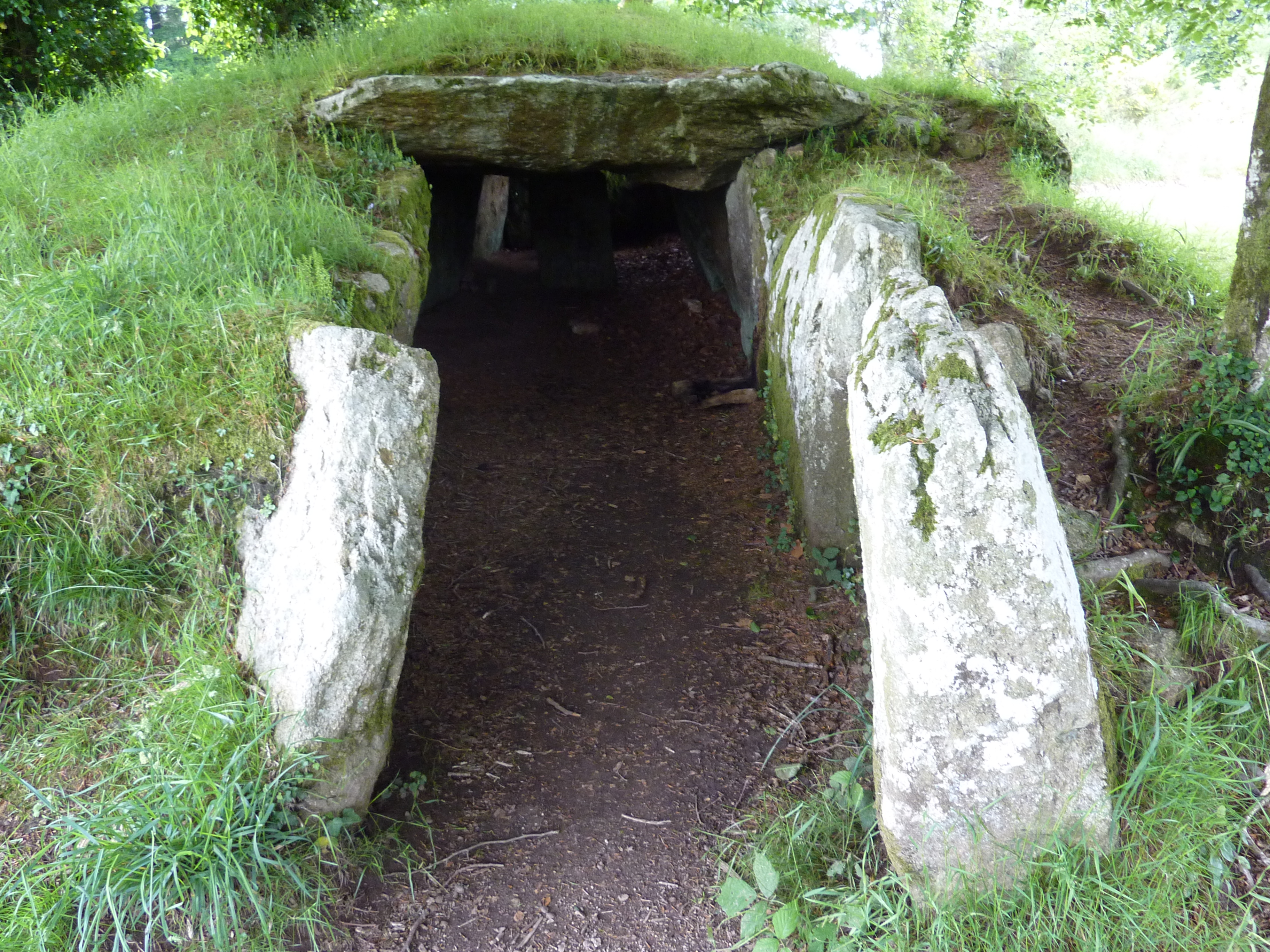 Brennilis: l'entrée de l'allée couverte "Ti ar Boudiged" ("maison des nains")